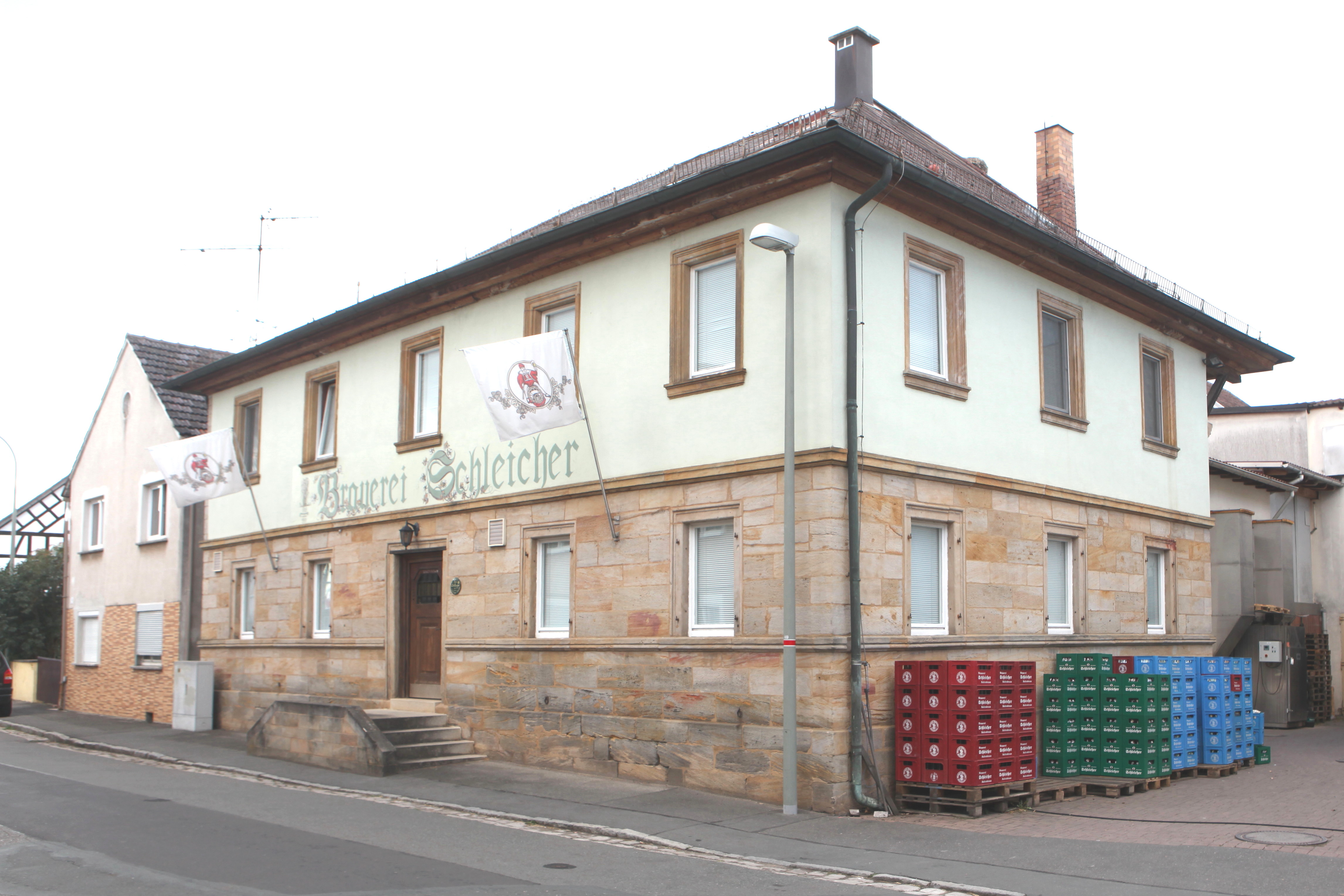 Brauerei Schleicher in Kaltenbrunn, Itzgrund